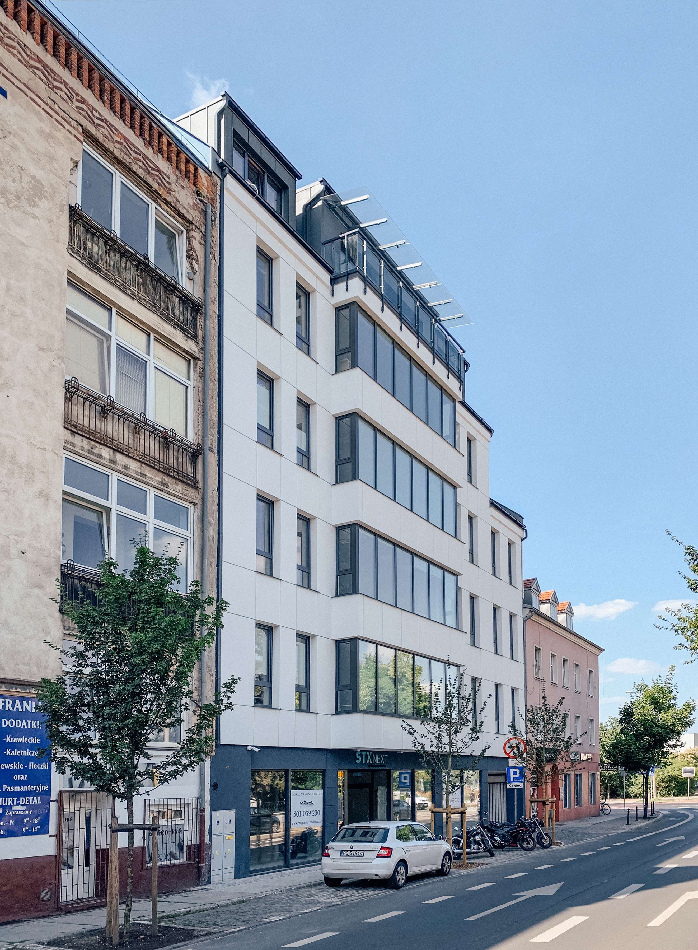 Poznań, Mostowa 38, Biuro STX Next